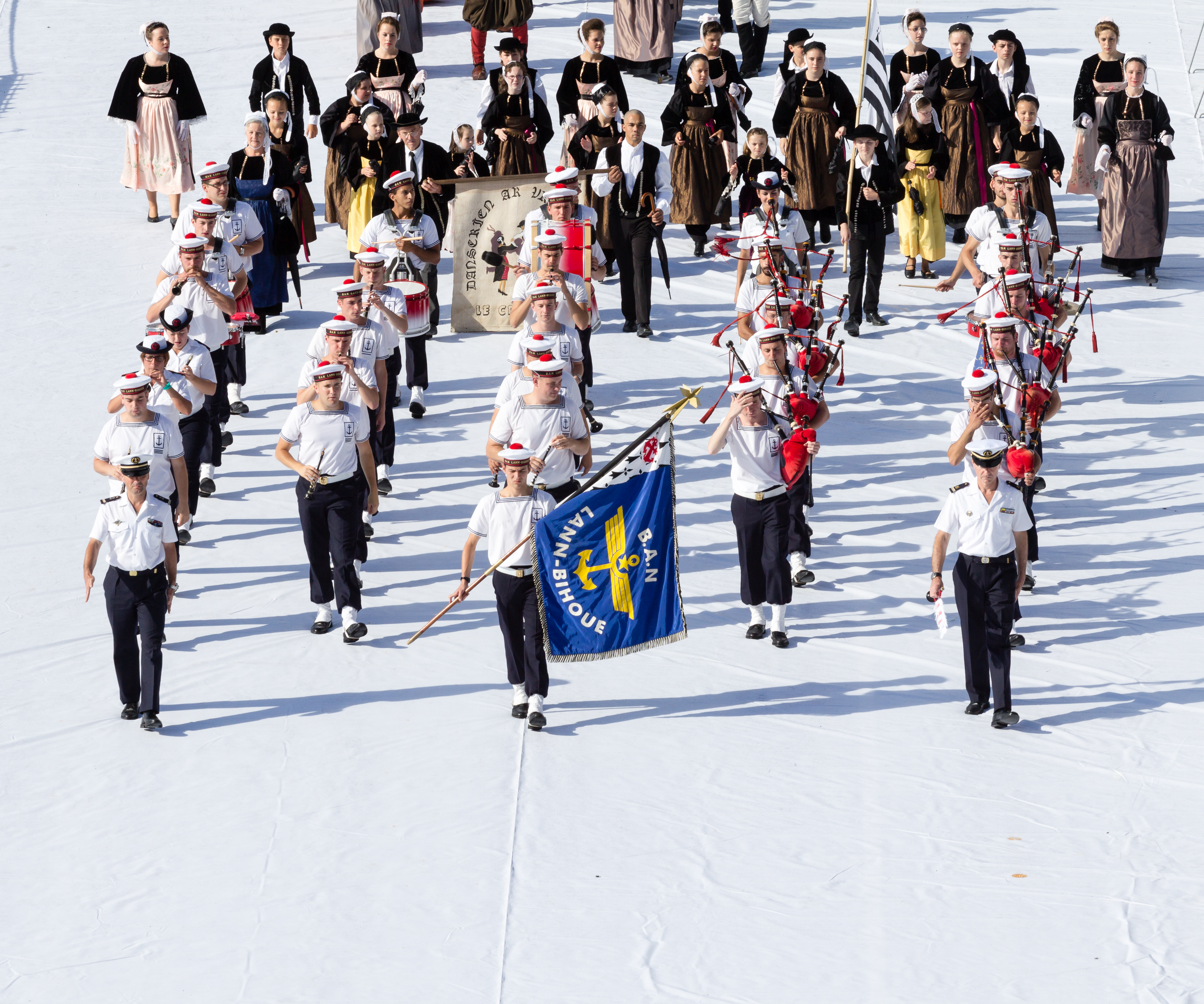 FIL 2012 - Arrivée de la grande parade des nations celtes - Bagad de Lann-Bihoué